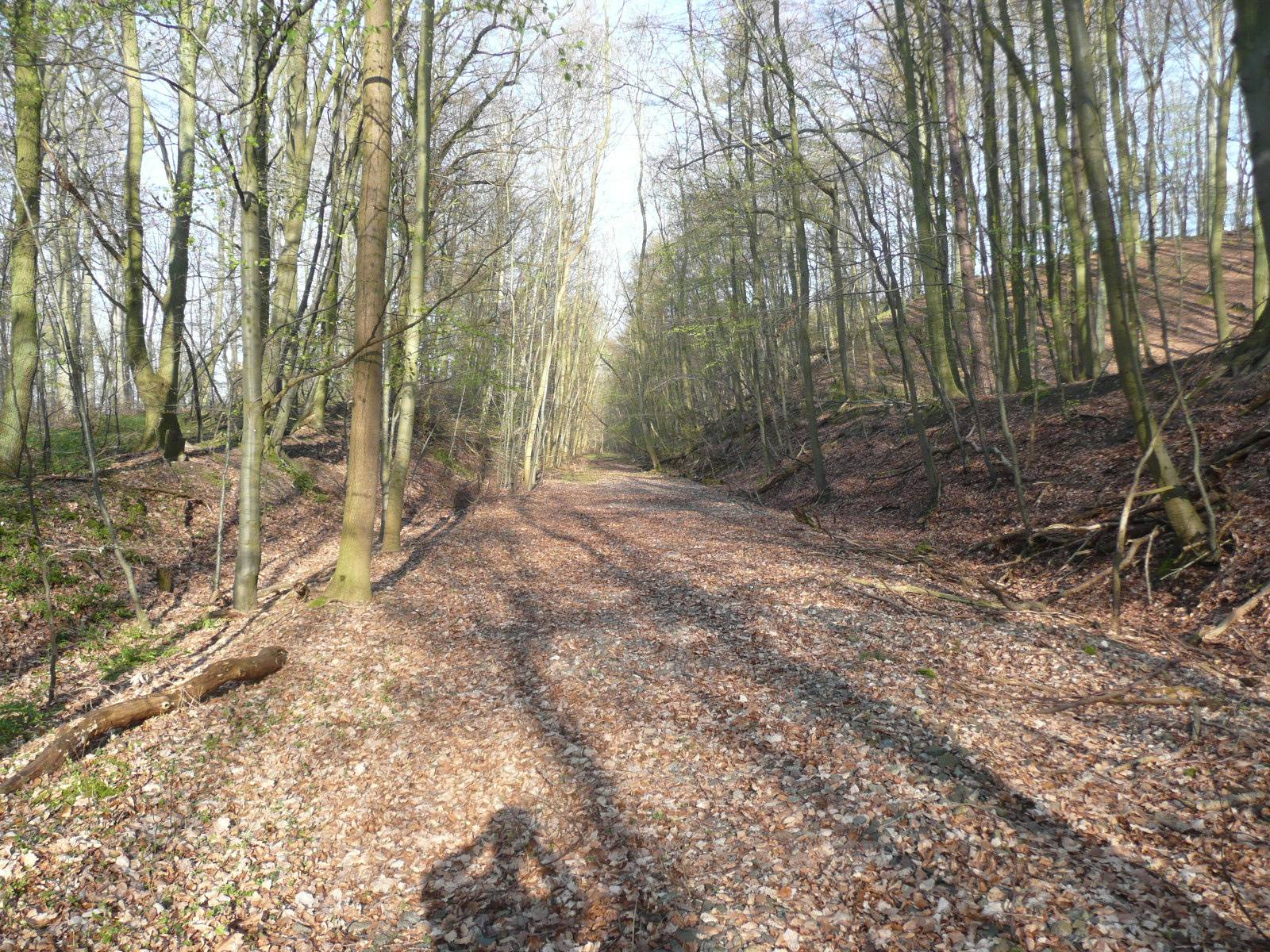 Widok na starotorze na odcinku Garz - Golm